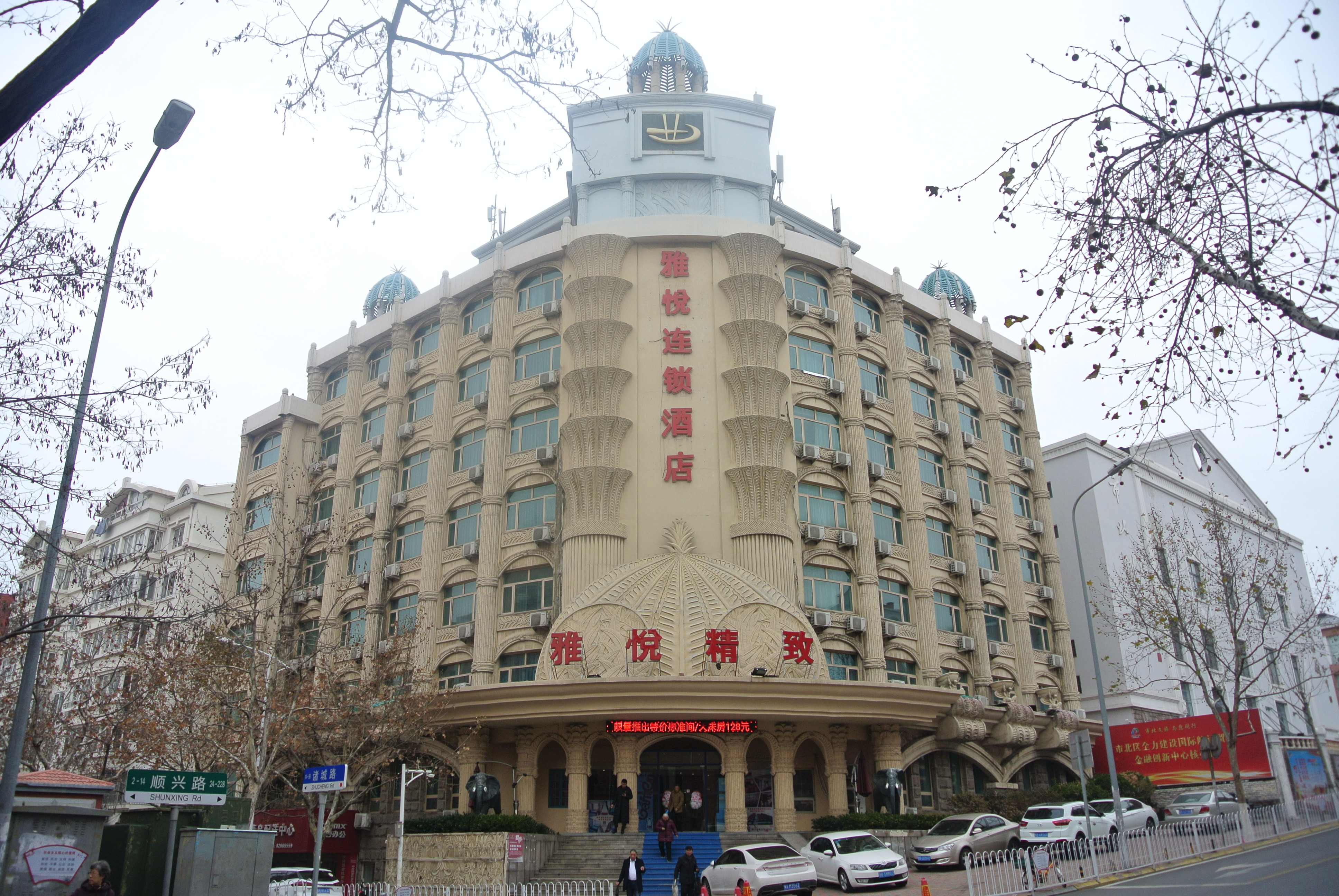 青岛原台东区委区政府办公楼